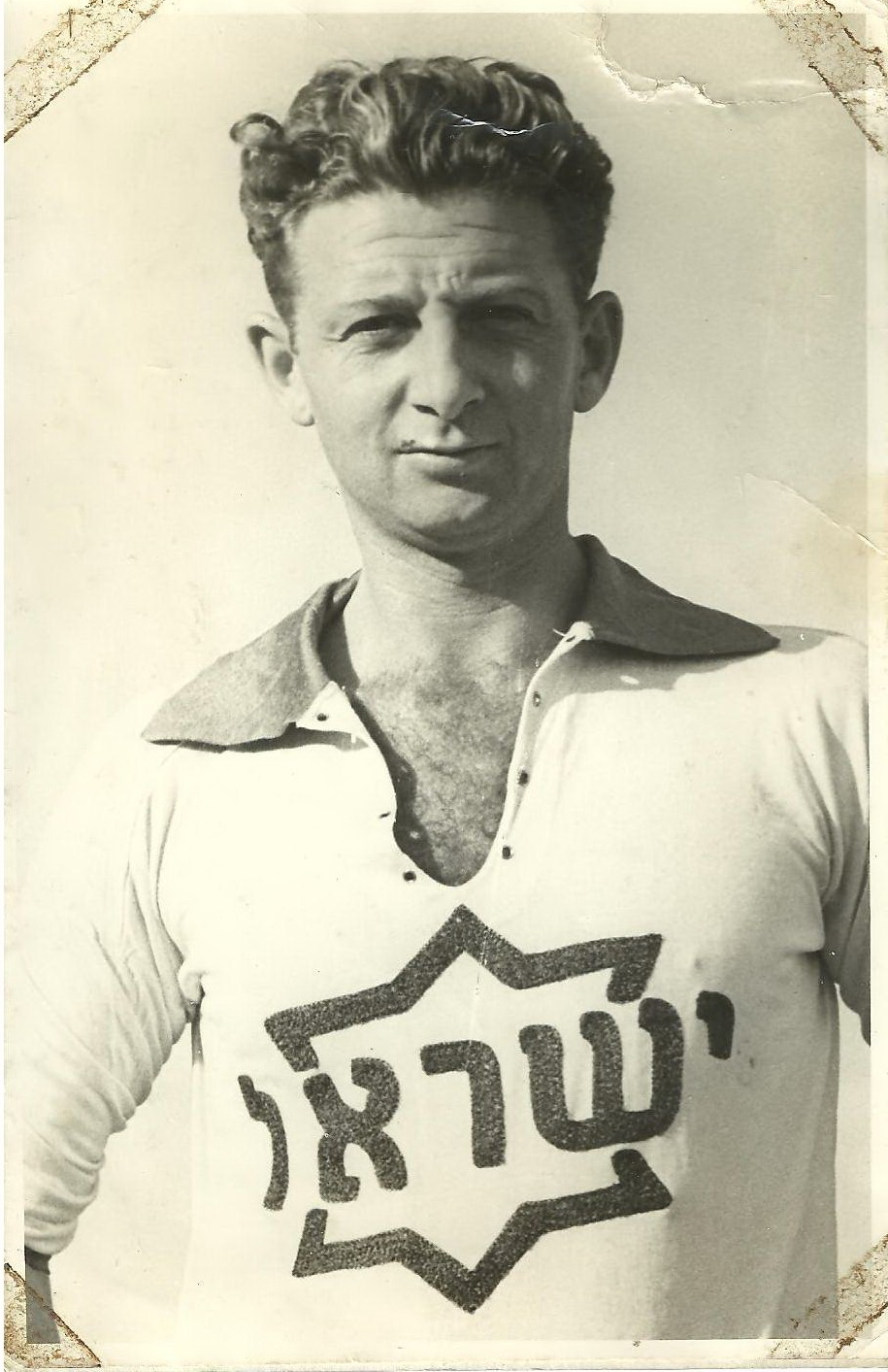 picture2